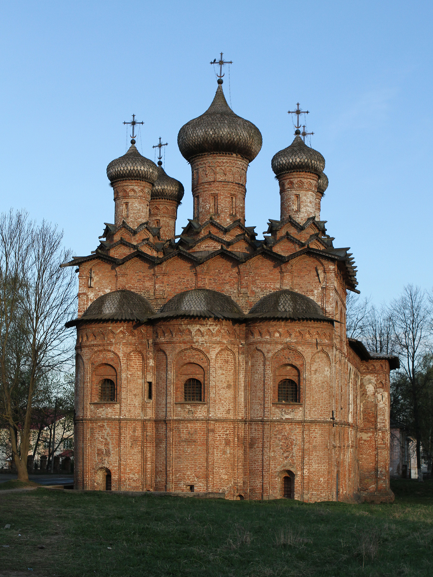 Трапезная с церковью Святой Троицы (церковь Троицы Духова монастыря): улица Духовская, 20, Великий Новгород, Новгородская область